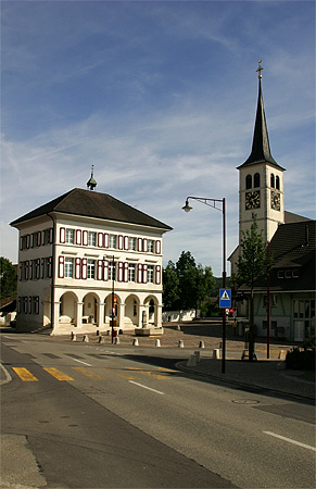 Dorfplatz in Röschenz